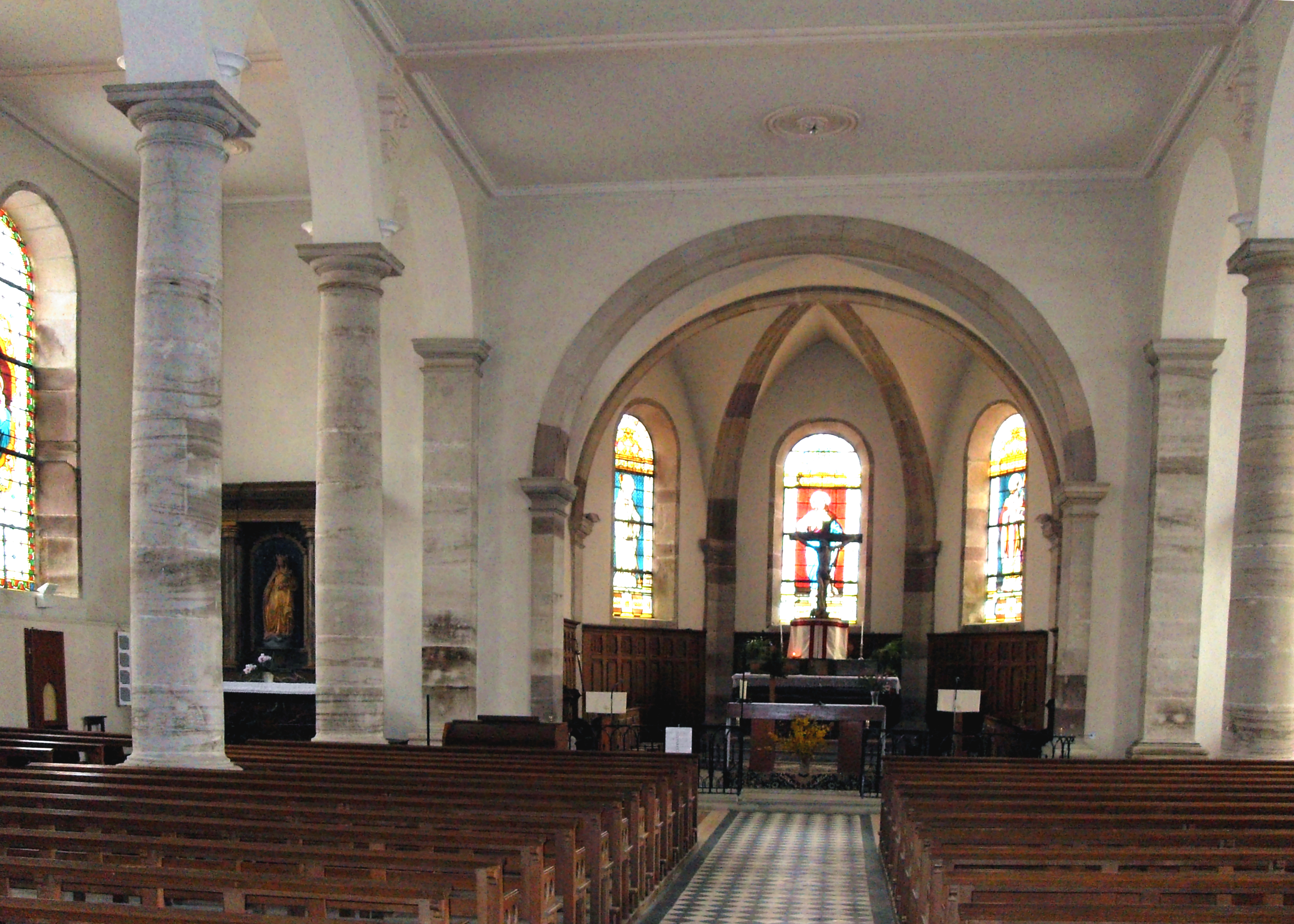 L'intérieur d'église Saint-Augustin à Chapelle-aux-Bois